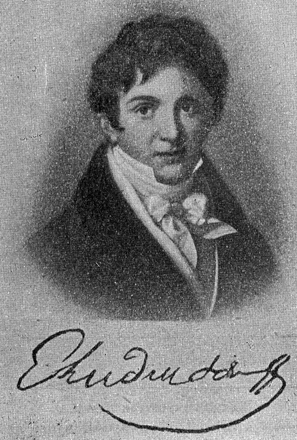 Eduard Ludendorff (1790-1824)